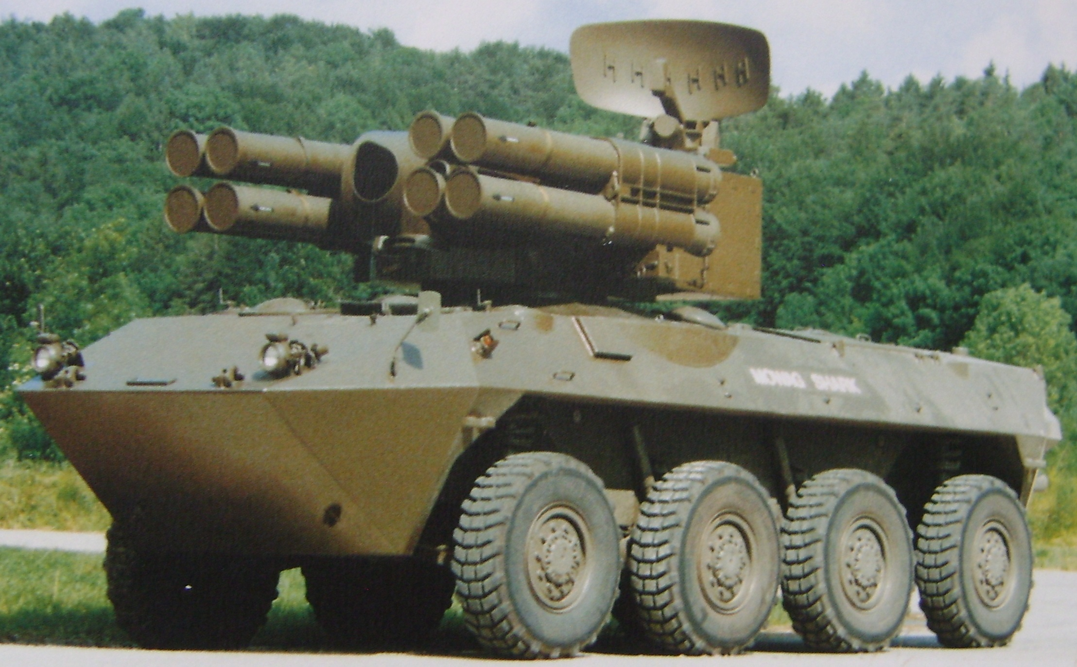 Shark Air def